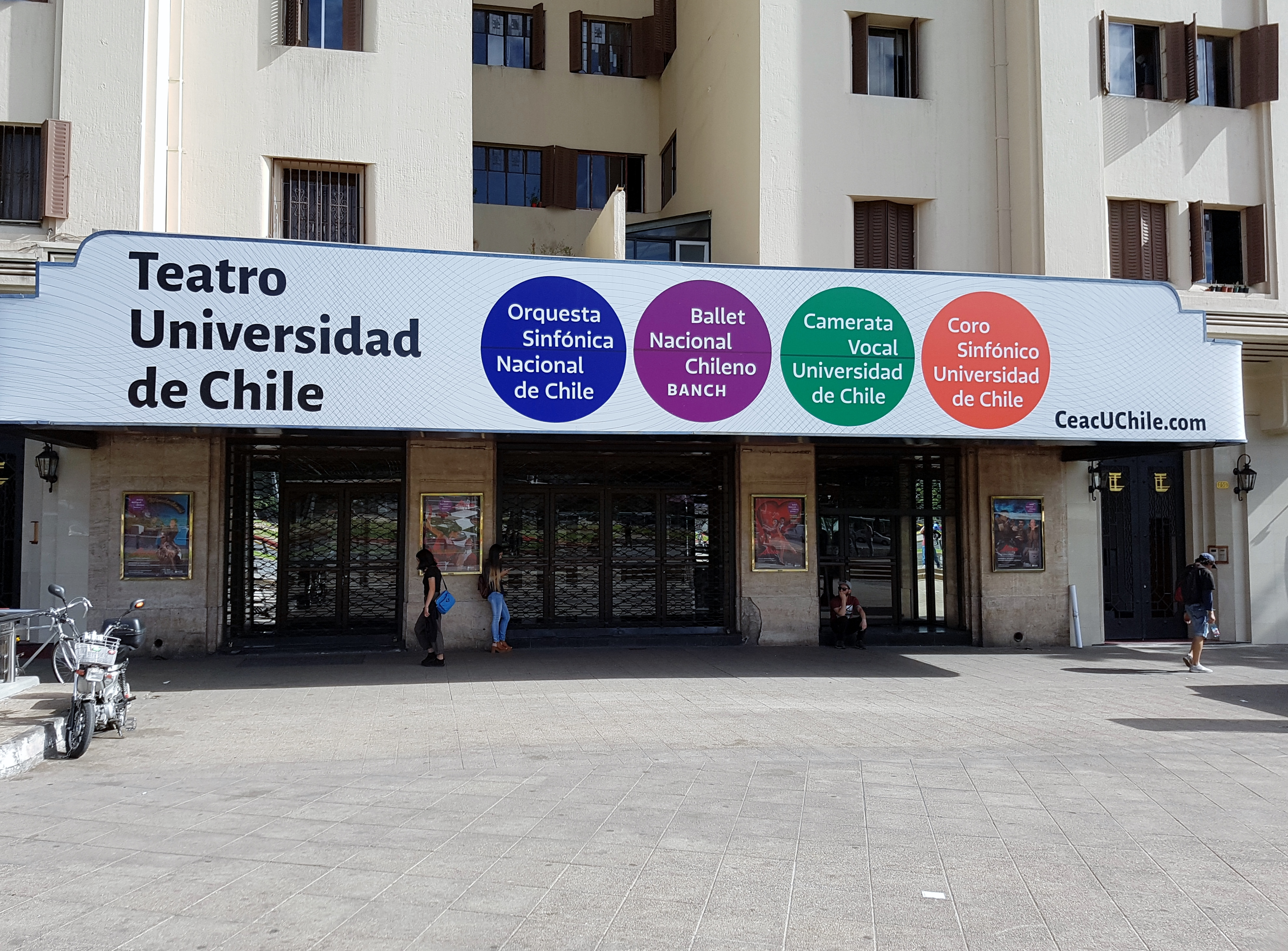 El Teatro Universidad de Chile se ubica en la planta baja de una de las torres Turri, al costado sur de la plaza Baquedano; allí dan sus funciones la Orquesta Sinfónica Nacional, el Ballet Nacional (Banch), la Camerata Vocal y el Coro Sinfónico. Queda a pasos del metro Baquedano; Providencia, Santiago de Chile